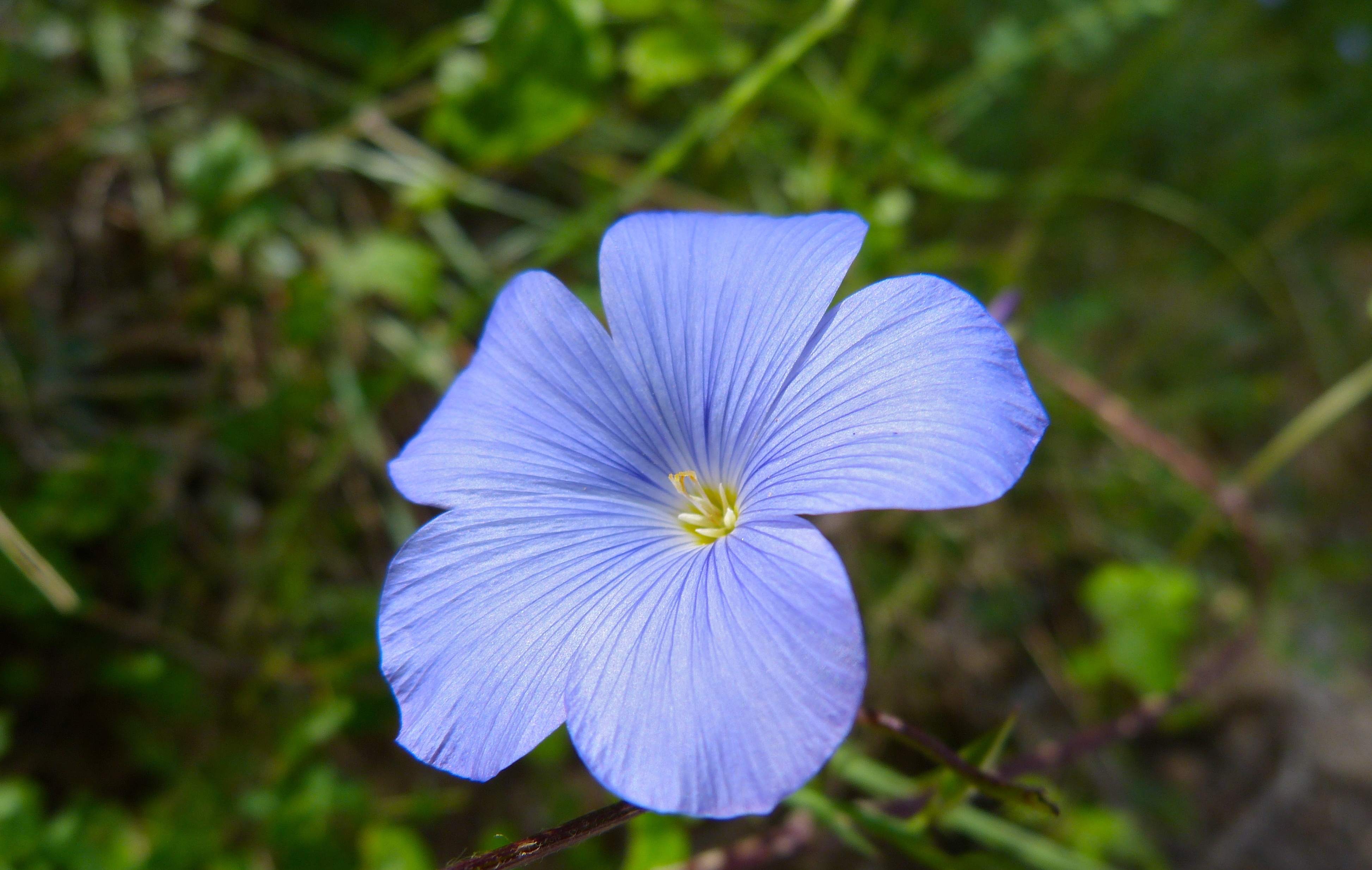 Mont-Ral, Tarragona, Catalonia, SPAIN